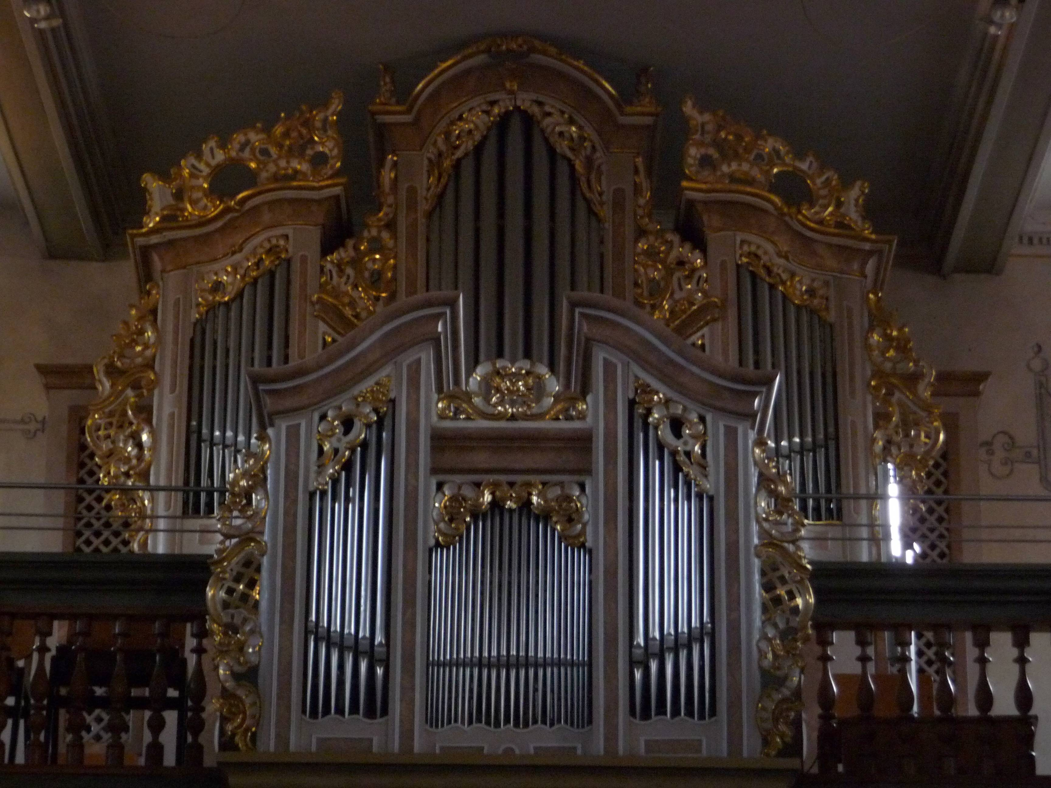 Bornefeld-Orgel in der evangelischen Kirche Schrozberg. Erbaut 1962 nach Entwurf von Helmut Bornefeld durch Gebrüder Link, Giengen 1962 (Hauptprospekt historisch 1779 von Johann Anton Ehrlich).